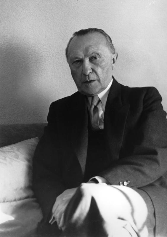 Bundeskanzler Konrad Adenauer